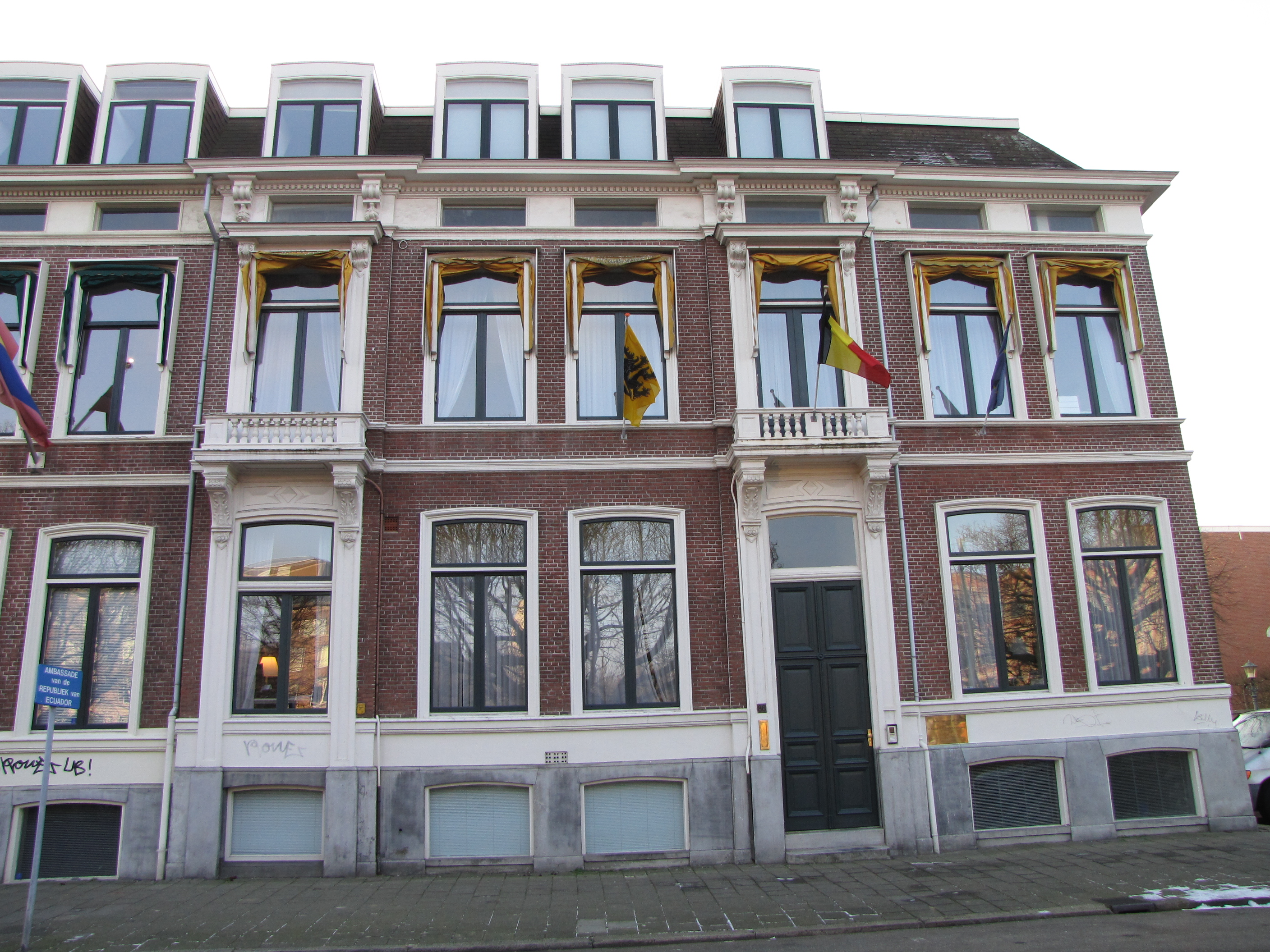 Vertegenwoordiging van Vlaanderen, Den Haag